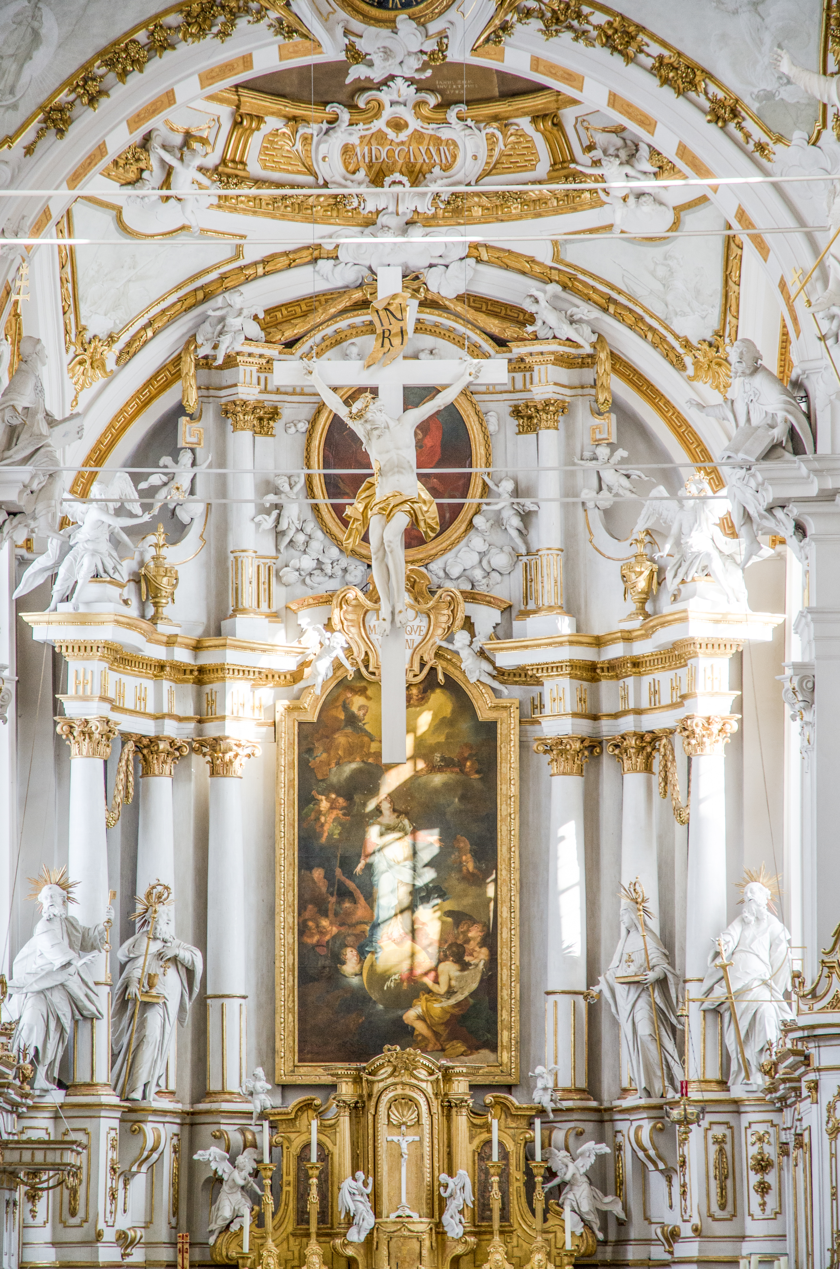 Elchingen, Klosterkirche St. Peter und Paul